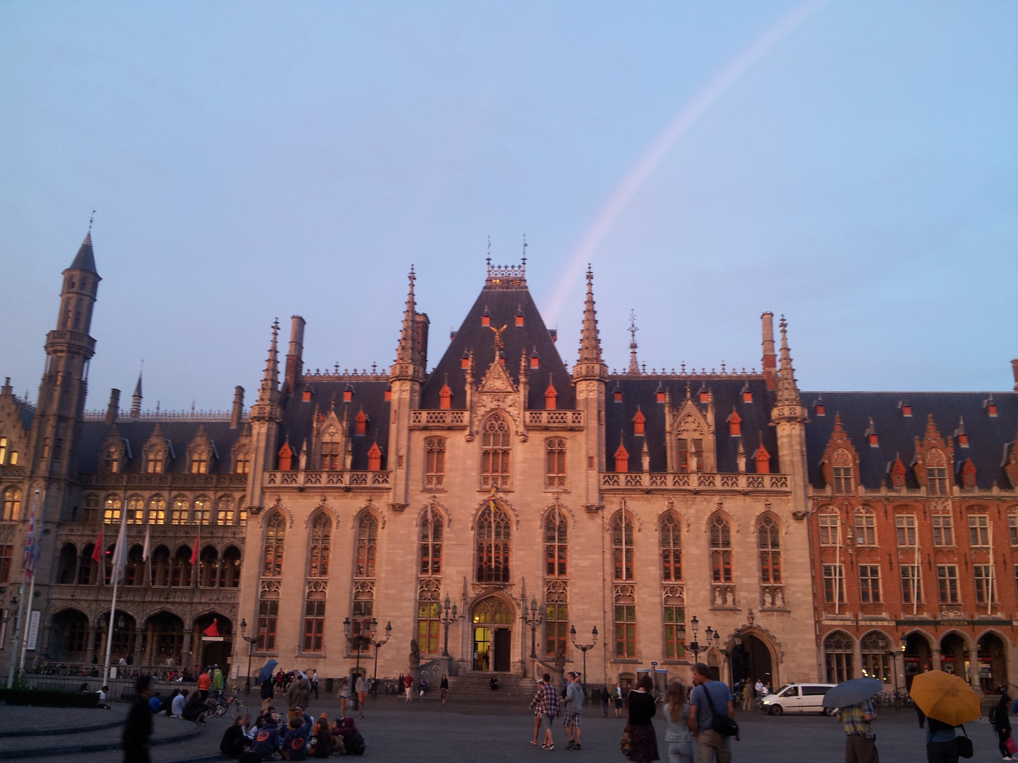 Brugge : Stadhuis